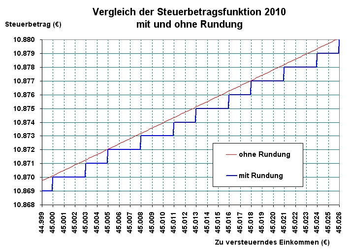 Vergleich der Steuerbetragsfunktion 2010 in Deutschland mit und ohne Rundung